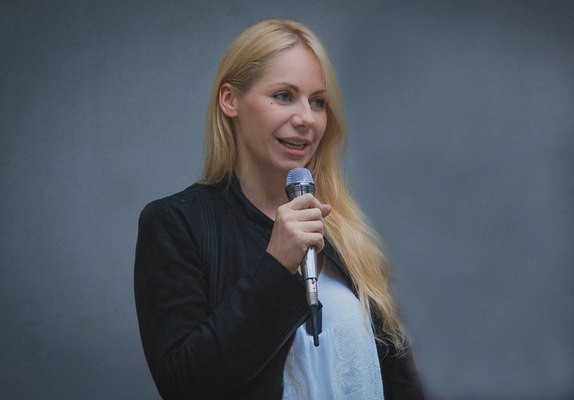 Слава Фролова открывает выставку Фонда, Одесса, 2013